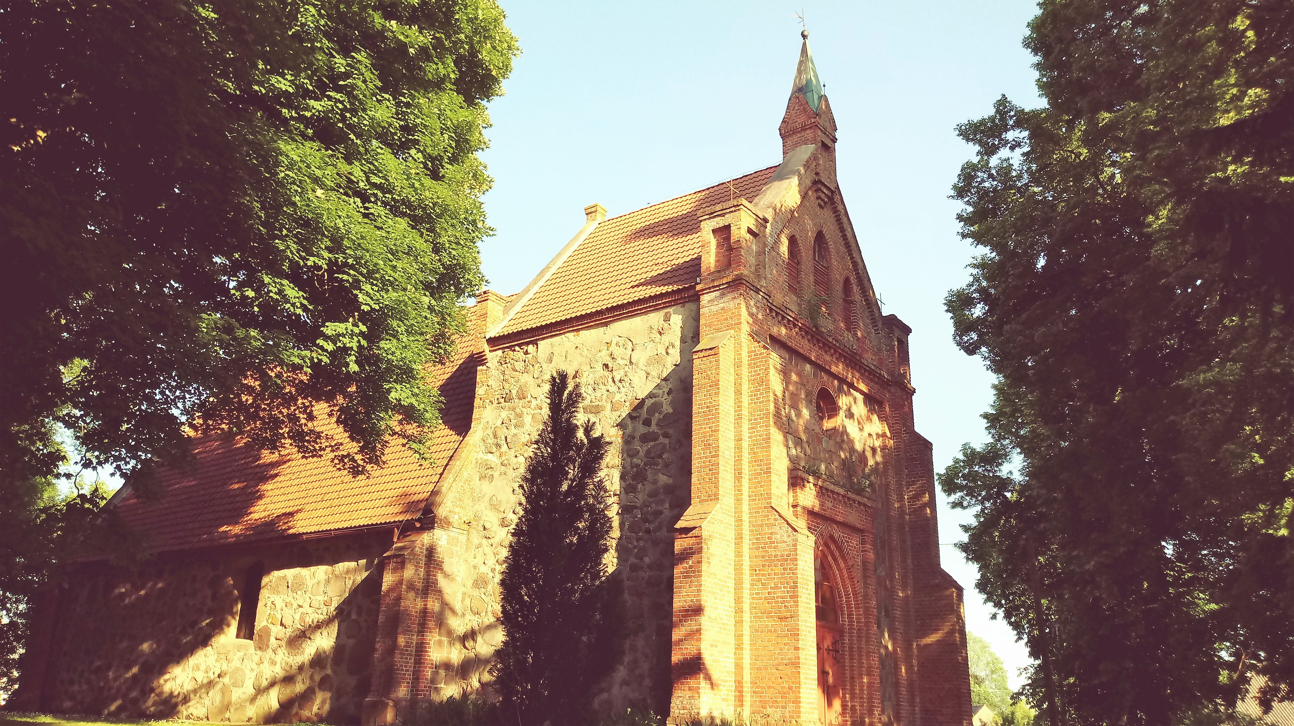 Kościół pw. Najświętszego Serca Pana Jezusa